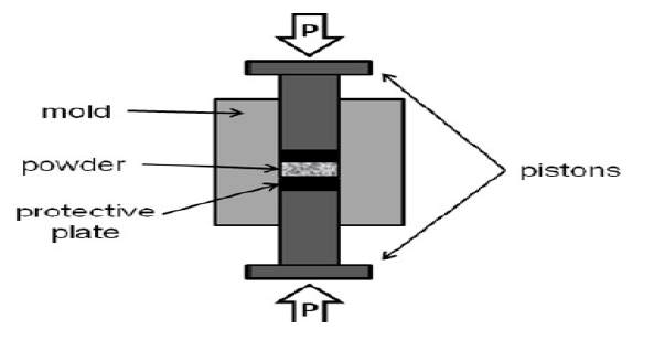 HUP method to pressure powder